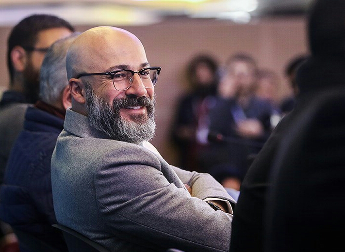 امیر آقایی - بهمن ۱۳۹۵